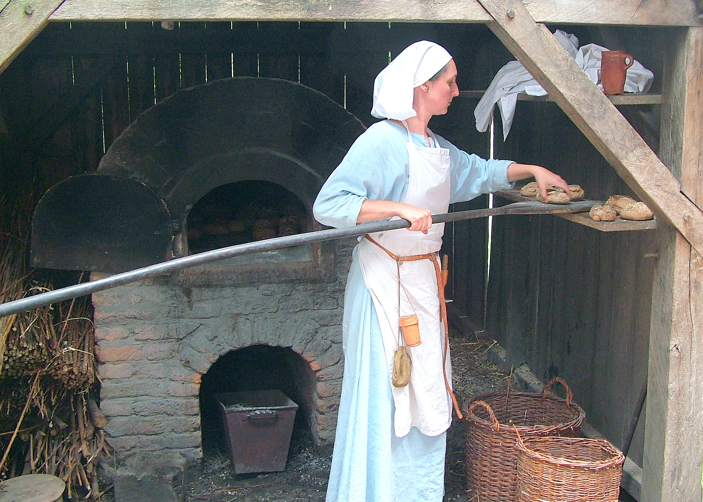 Archeon, Bäckerin Mittelalter (Jocelyne Assink).